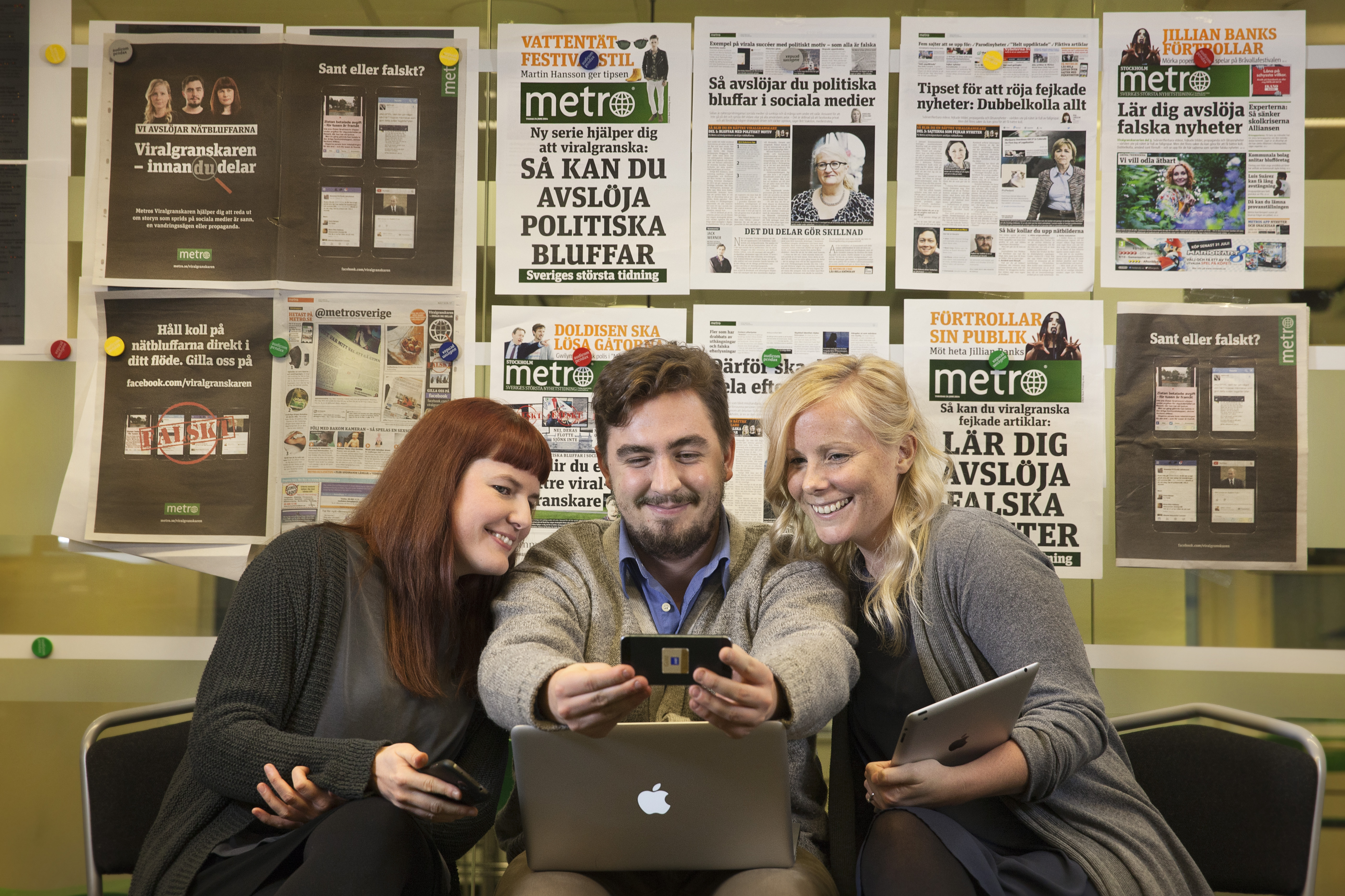 Journalisterna (från vänster): Åsa Larsson, Jack Werner och Linnéa Jonjons.